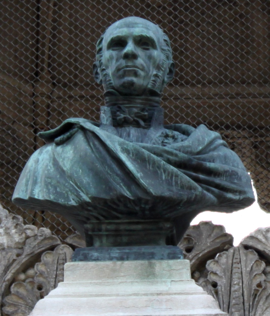 Henry Darcy, Jardin Darcy à Dijon, Bourgogne, FRANCE